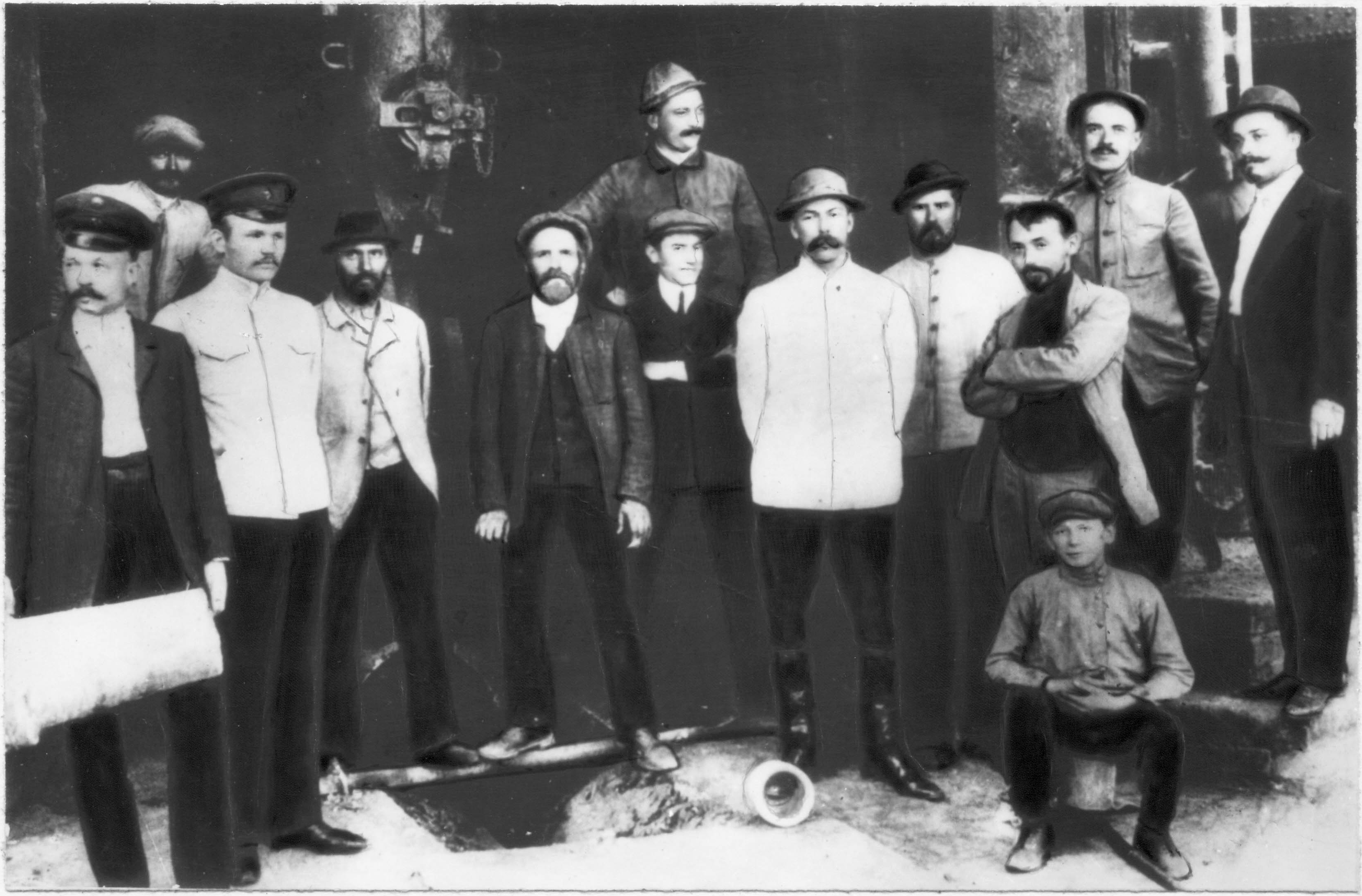 Владимир Иванович Гулыга (1882-1938) — выдающийся русский металлург-доменщик, ученик М.А. Павлова и М.К. Курако. Главный инженер ряда металлургических заводов. Инициатор строительства современных доменных печей большого объема. Внес существенный вклад в развитие представлений об управлении ходом доменных печей. Автор многих статей и книг по доменному производству.